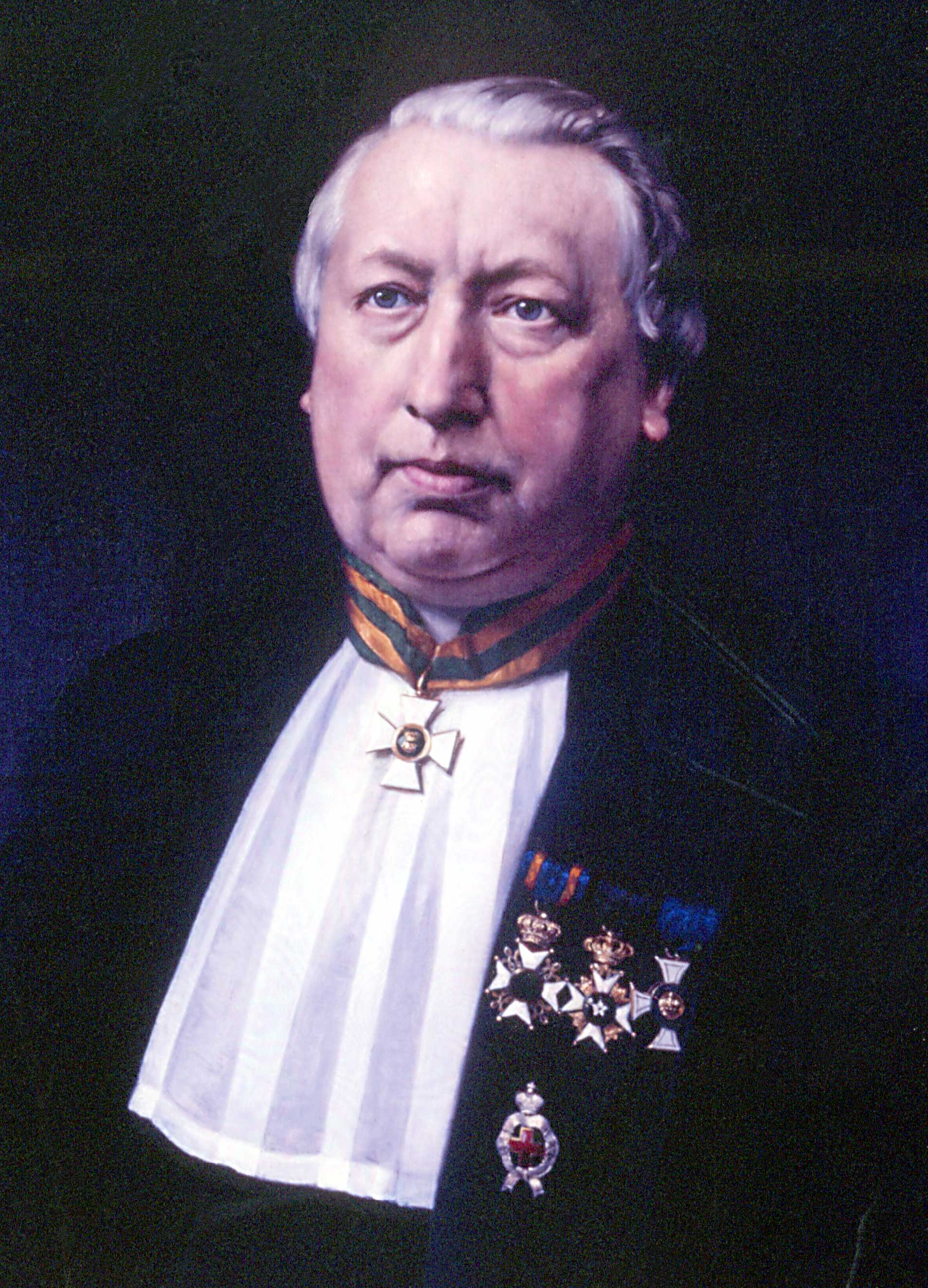 Johannes Jacobus van Oosterzee (1817-1882), Dutch theologian (reformierter Theologe)